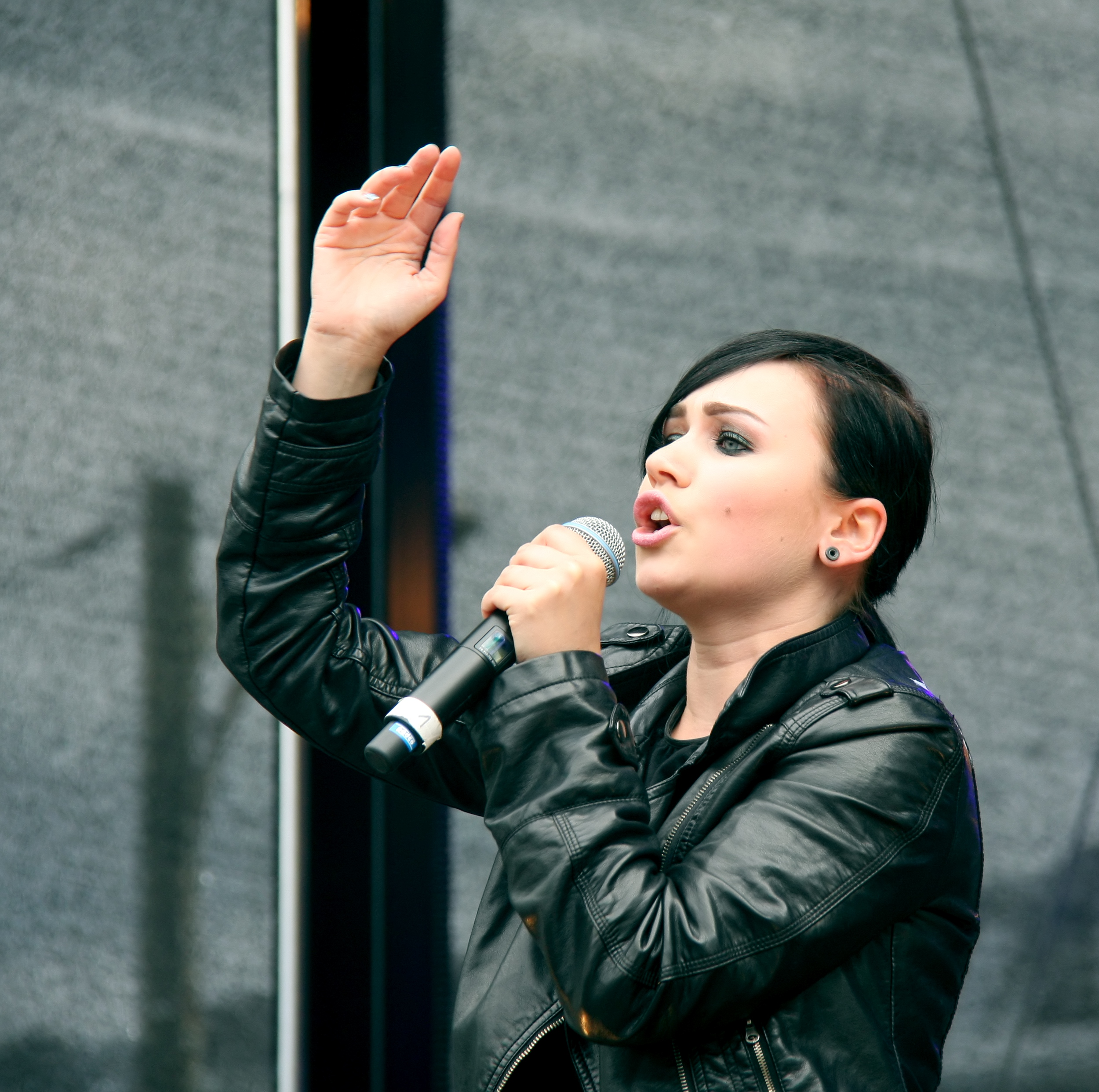 Laura Carbone der Electro-Pop-Punk-Band "Deine Jugend" aus Mannheim. Bühnenprogramm zum CSD-Straßenfest/ColognePride 2011. Hauptbühne auf dem Heumarkt, Köln.